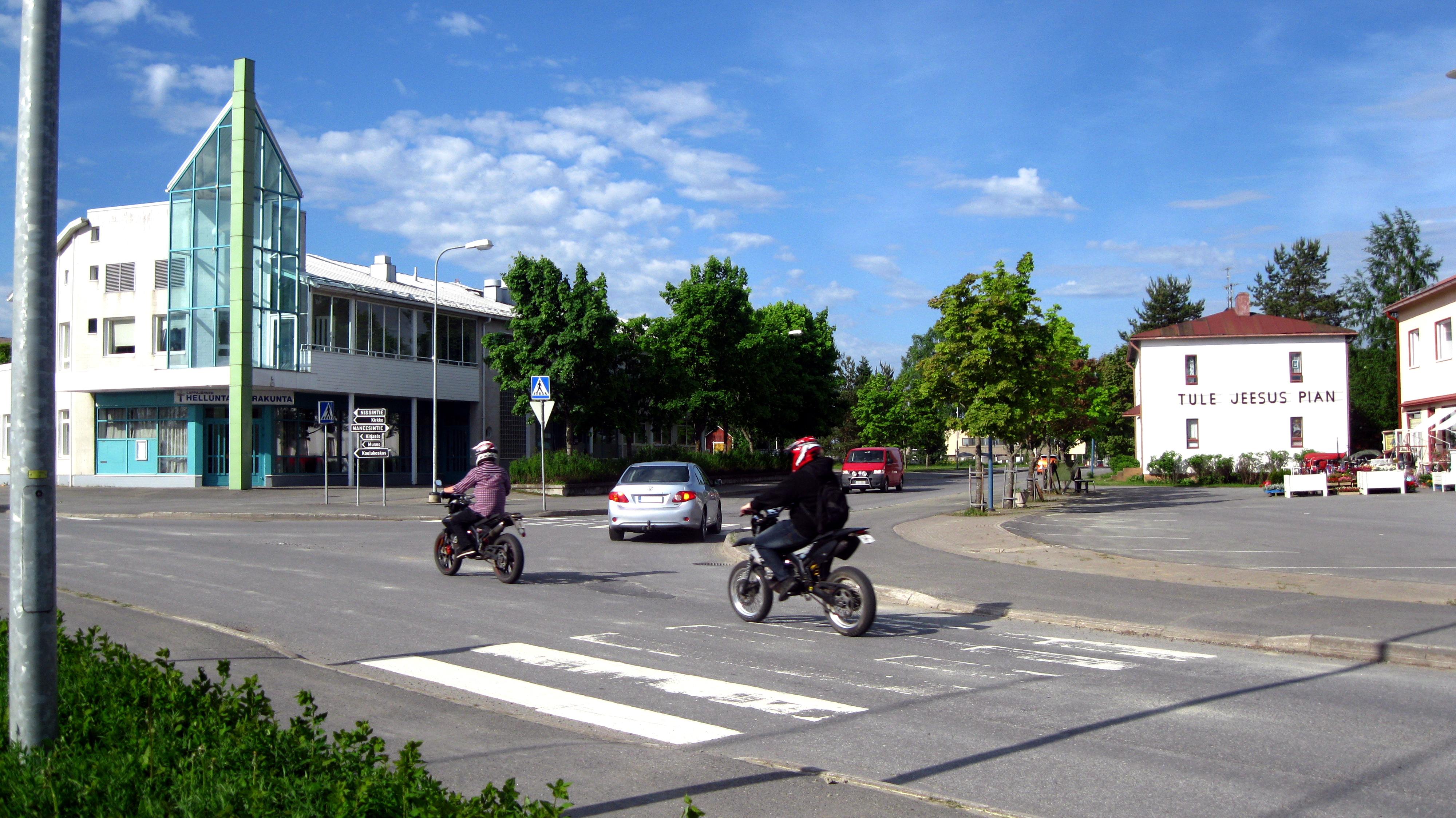 Lappajärven keskustaa kesäkuussa 2016.